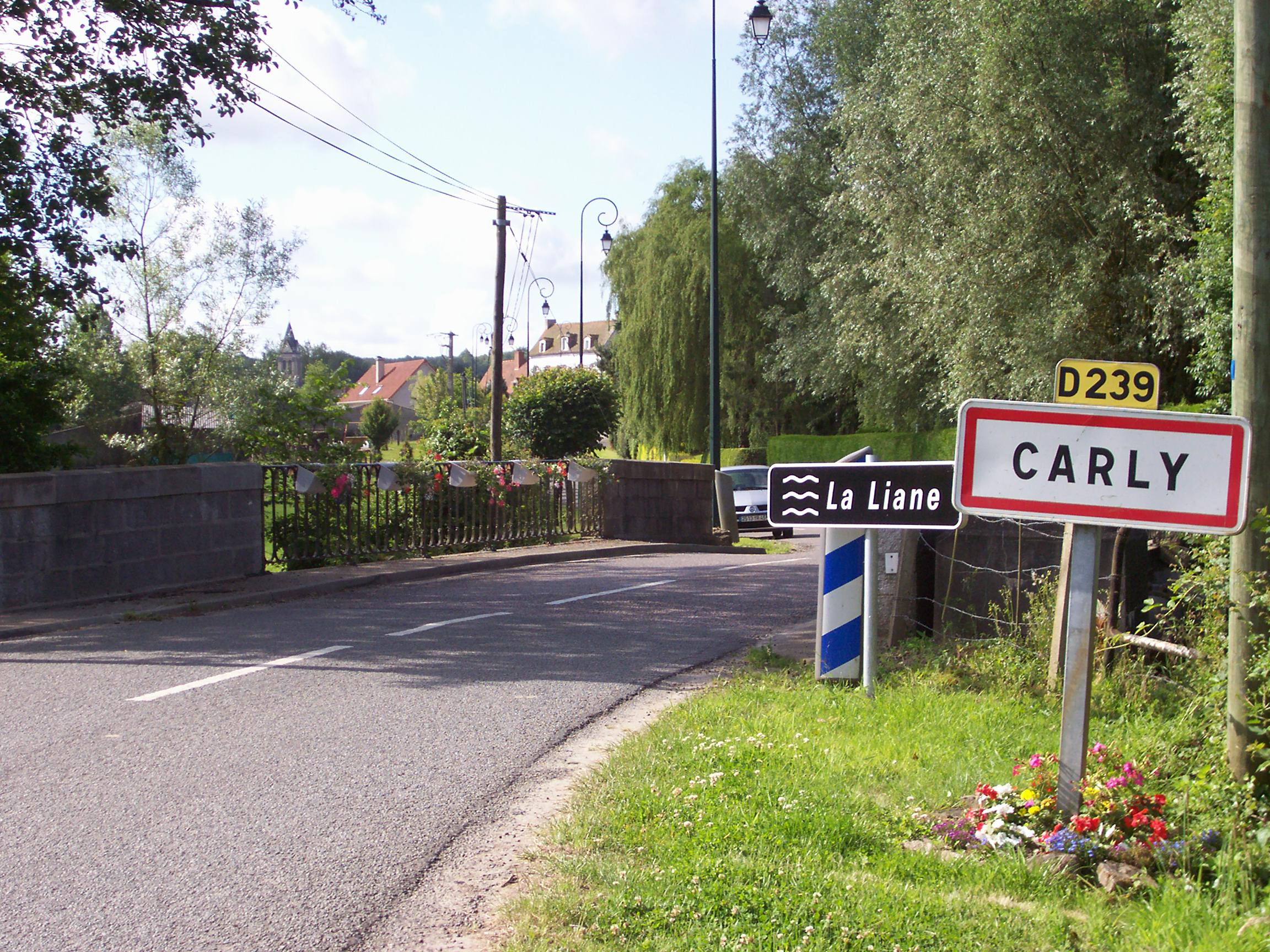 Entrée de la commune de Carly, dans le Pas de Calais (France), par la Départementale 239, au niveau du pont du fleuve de la Liane.